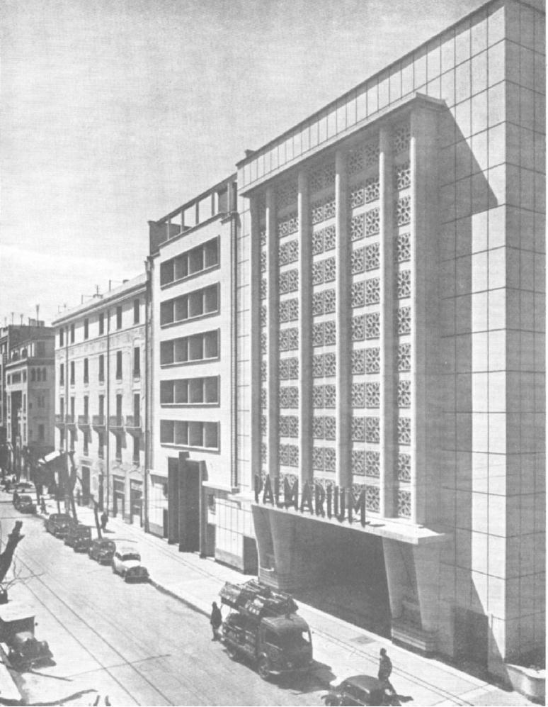 Le Casino Municipal "Le Palmarium" et la Galerie des Arts, Avenue de Carthage, Tunis, Tunisie